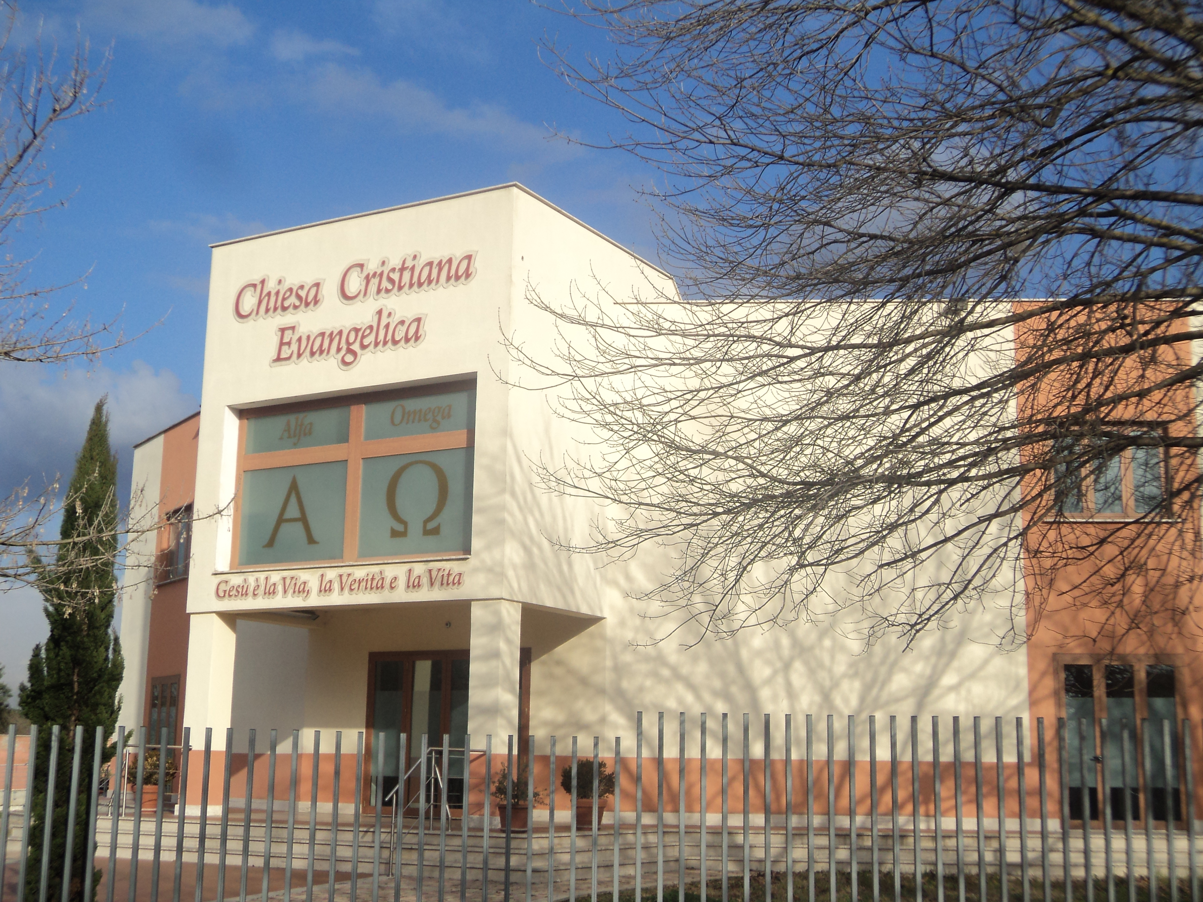 Chiesa Cristiana Evangelica Alfa-Omega - Tor Sapienza - Roma